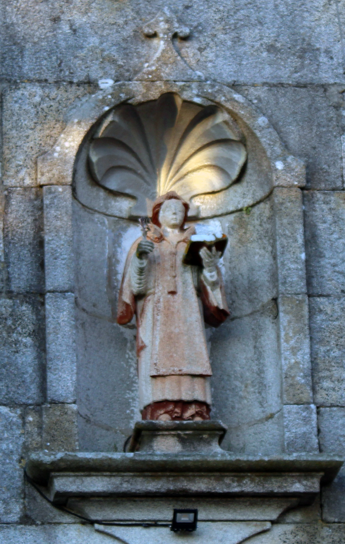 Imaxe policromada de San Vicente na Igrexa de Mañufe